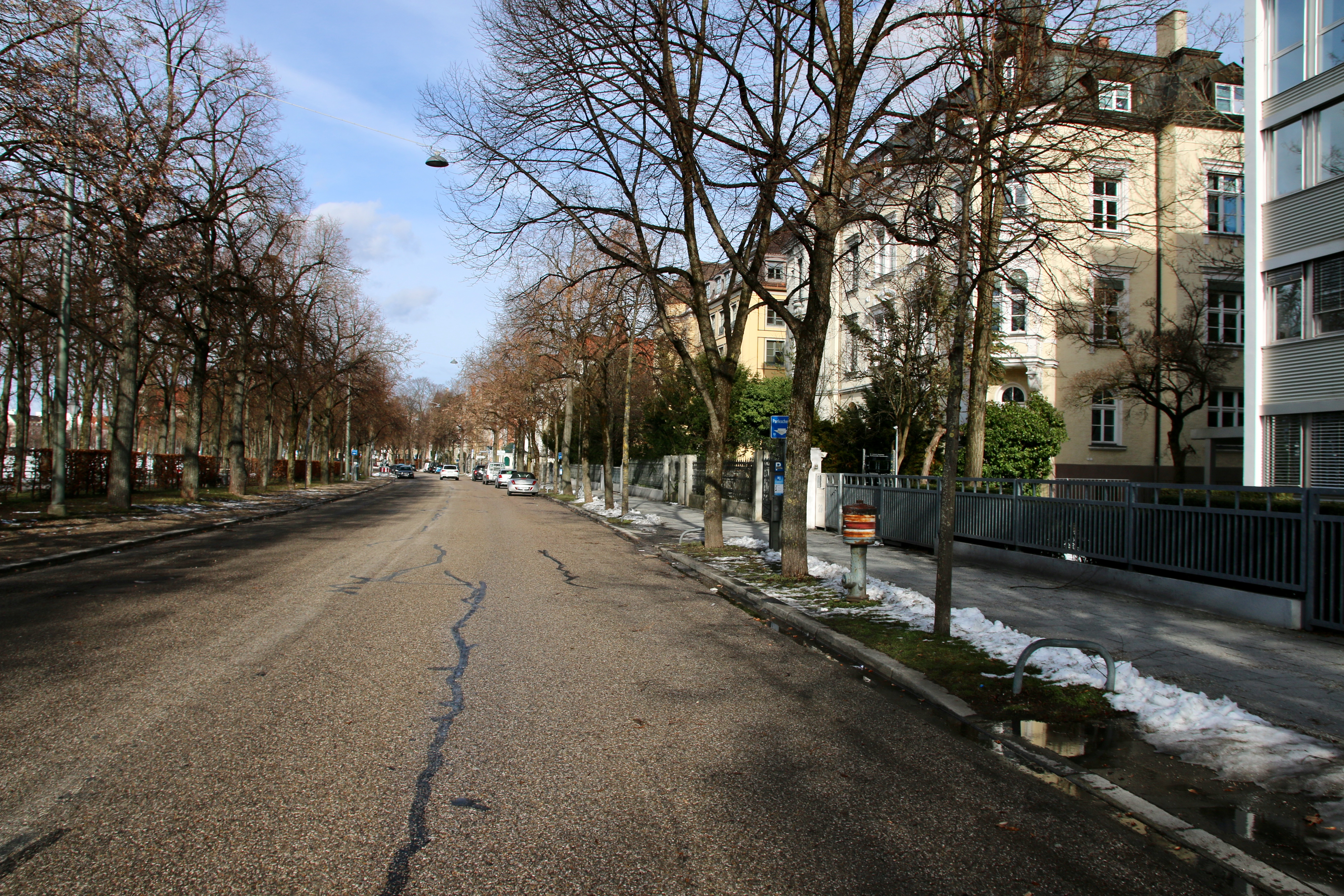 Der Bavariaring mit Villen auf der rechten Seite und der Thersienwiese auf der linken Seite.